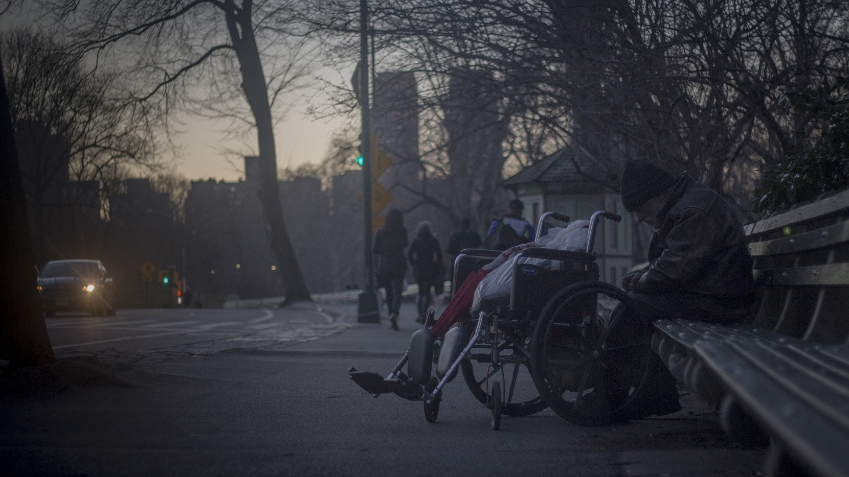 Un senzatetto seduto su una panchina tra i palazzi di New York